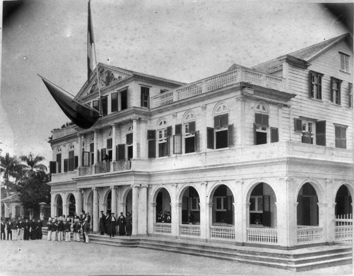 Foto. Audiëntie op het Gouvernementspaleis in Paramaribo ter gelegenheid van Koninginnedag.